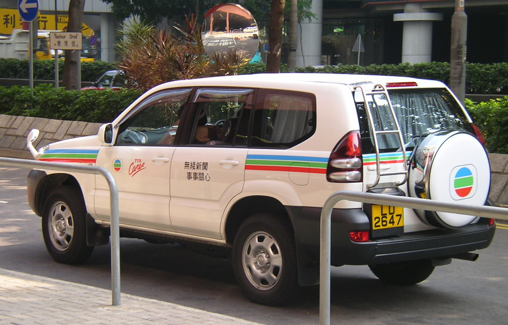 無綫新聞採訪車LD2647停在香港灣仔港灣徑。